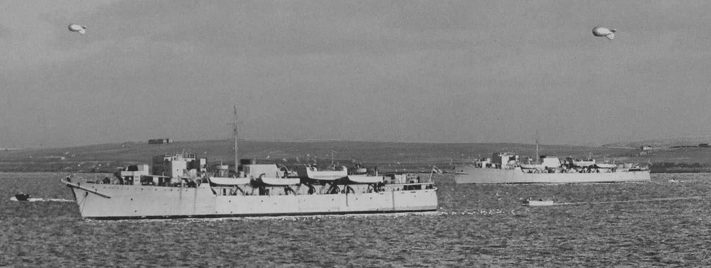 Die niederländische Kanalfähren Queen_Emma und Princess_Beatrix als Landing ships Infantry in Scapa Flow